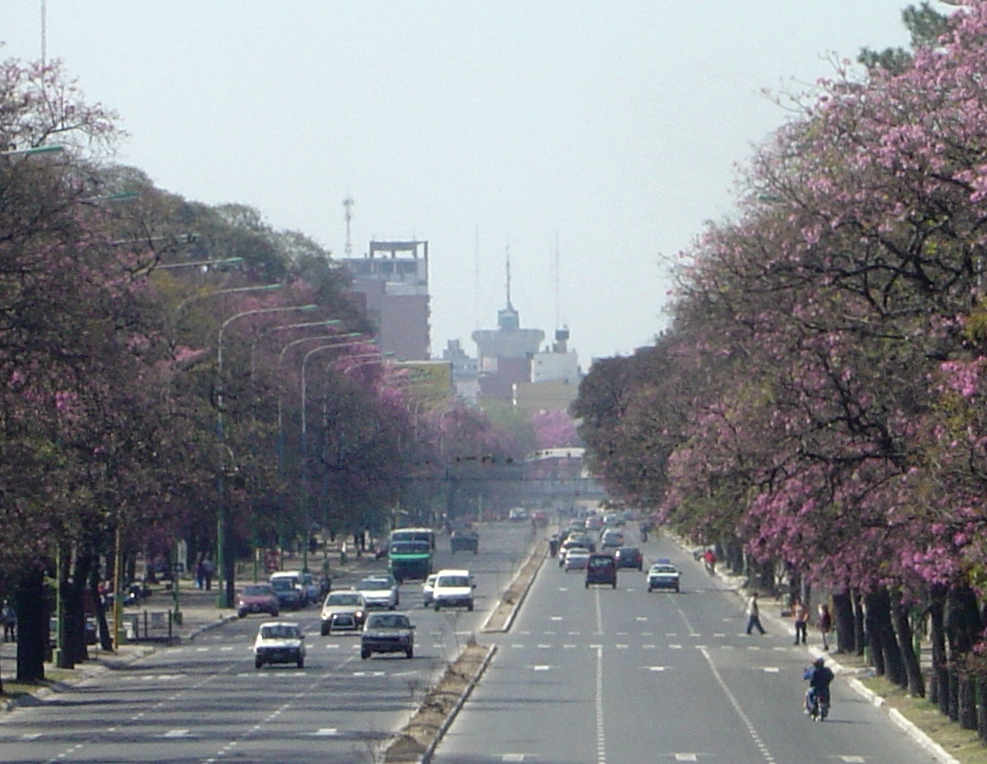 Mate de Luna Ave., Tucuman, Argentina.